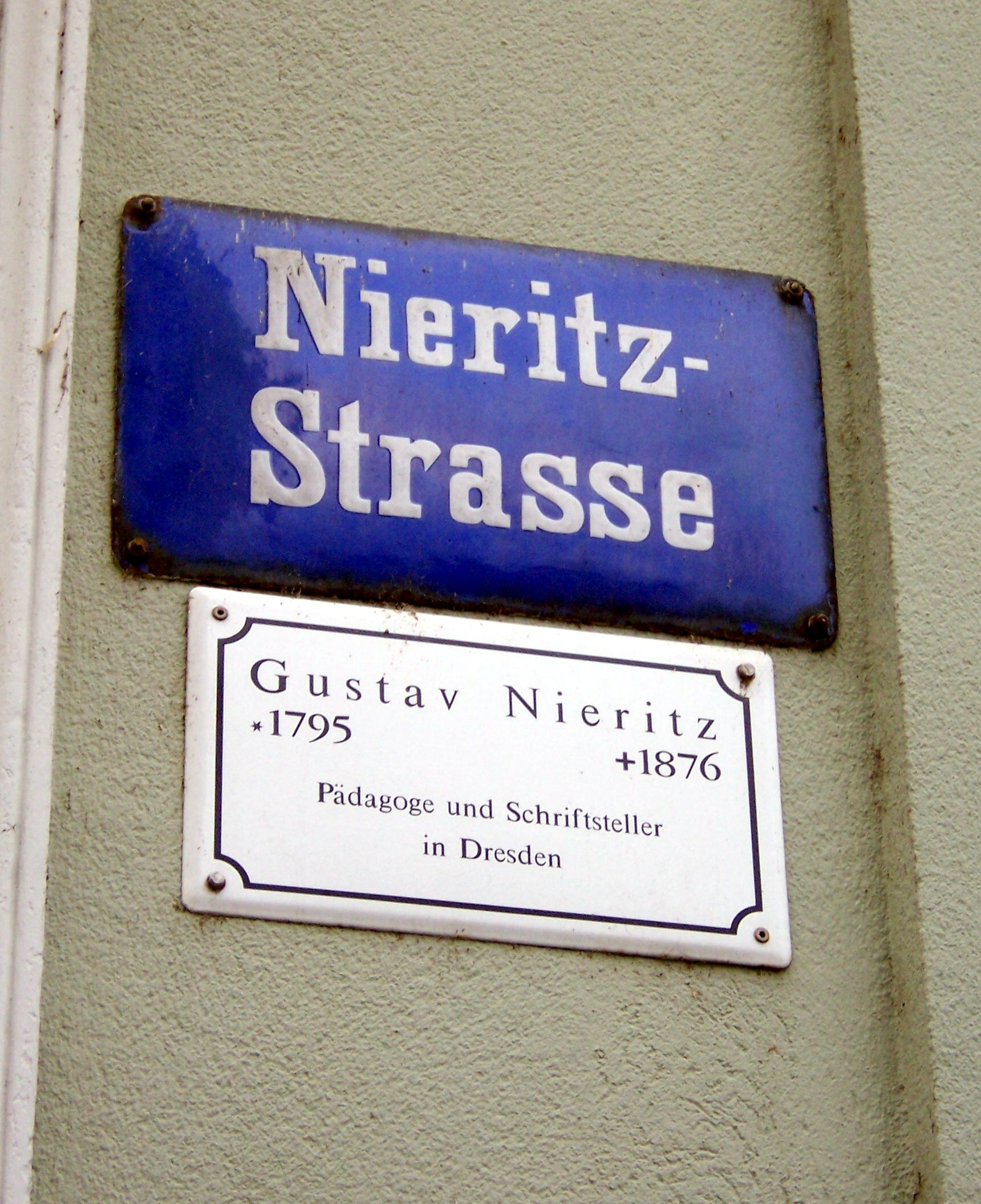 Straßenschild Nieritzstraße in Dresden.